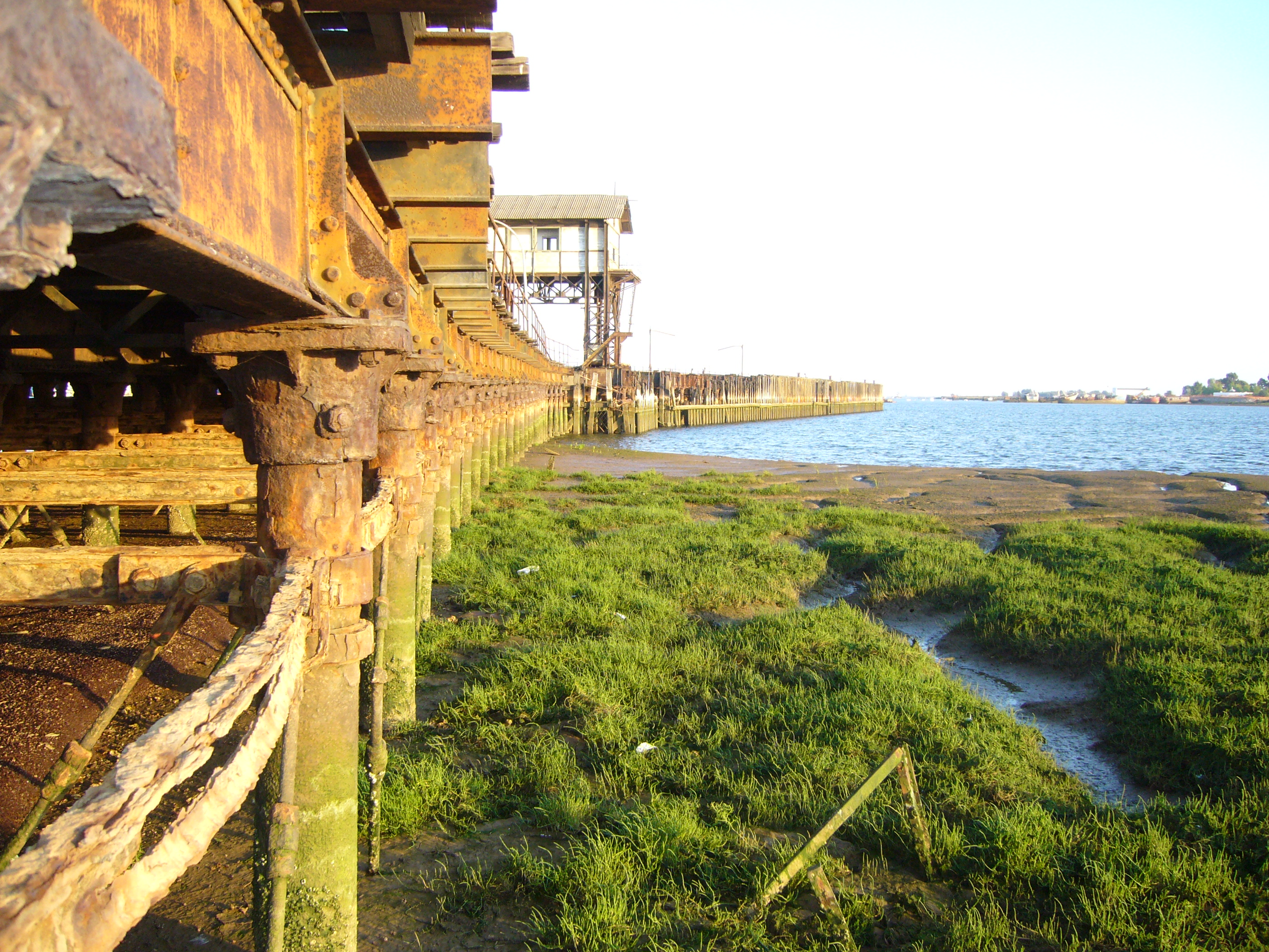 Marismas del Odiel This is a photography of a Special Area of Conservation in Spain with the ID: ES0000025. Natura2000 entry, EEA entry